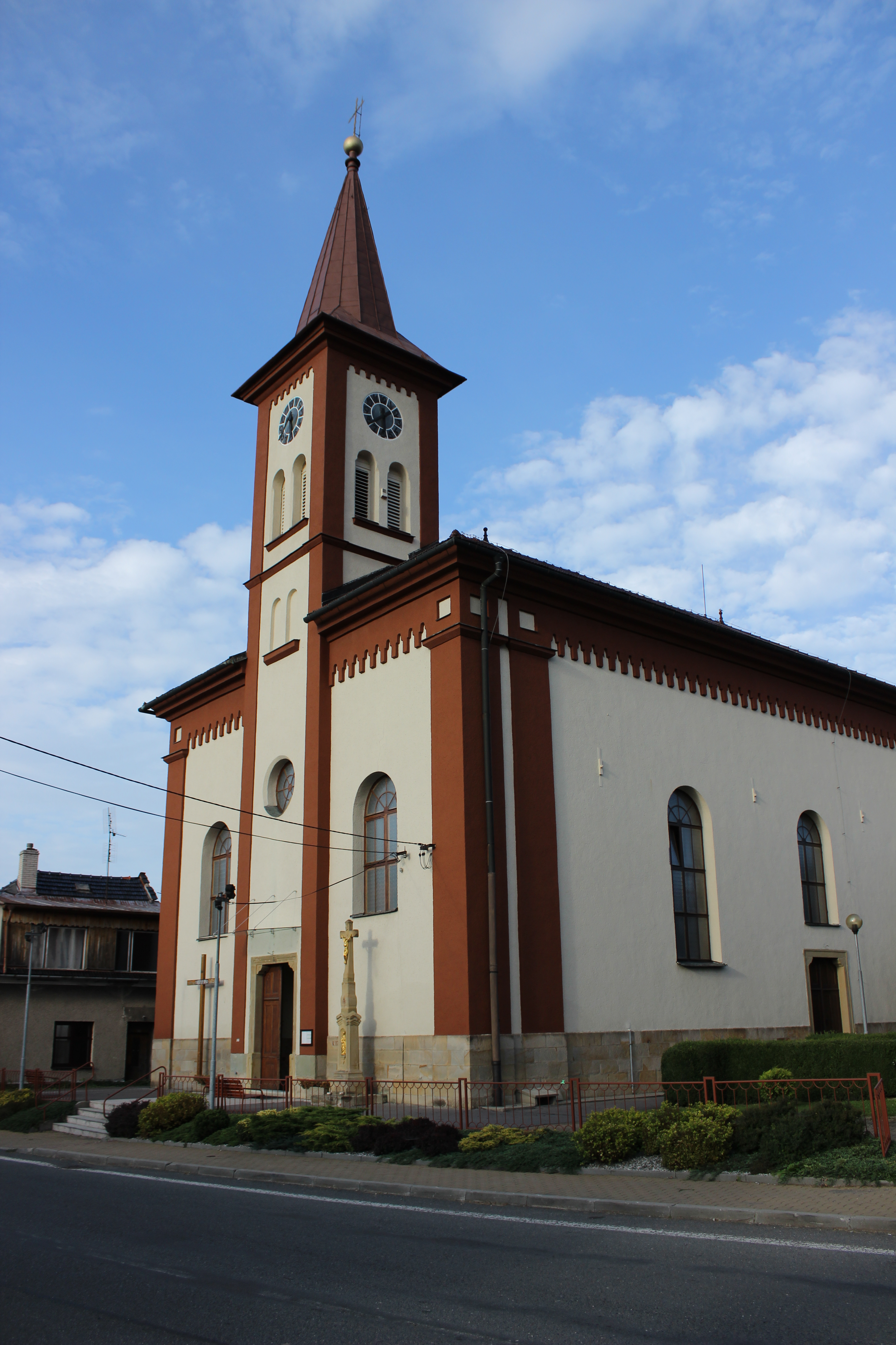 Jižní pohled na kostel svatého Jiří v Mořkově. This image was acquired during the event Wikiměsto Kopřivnice.